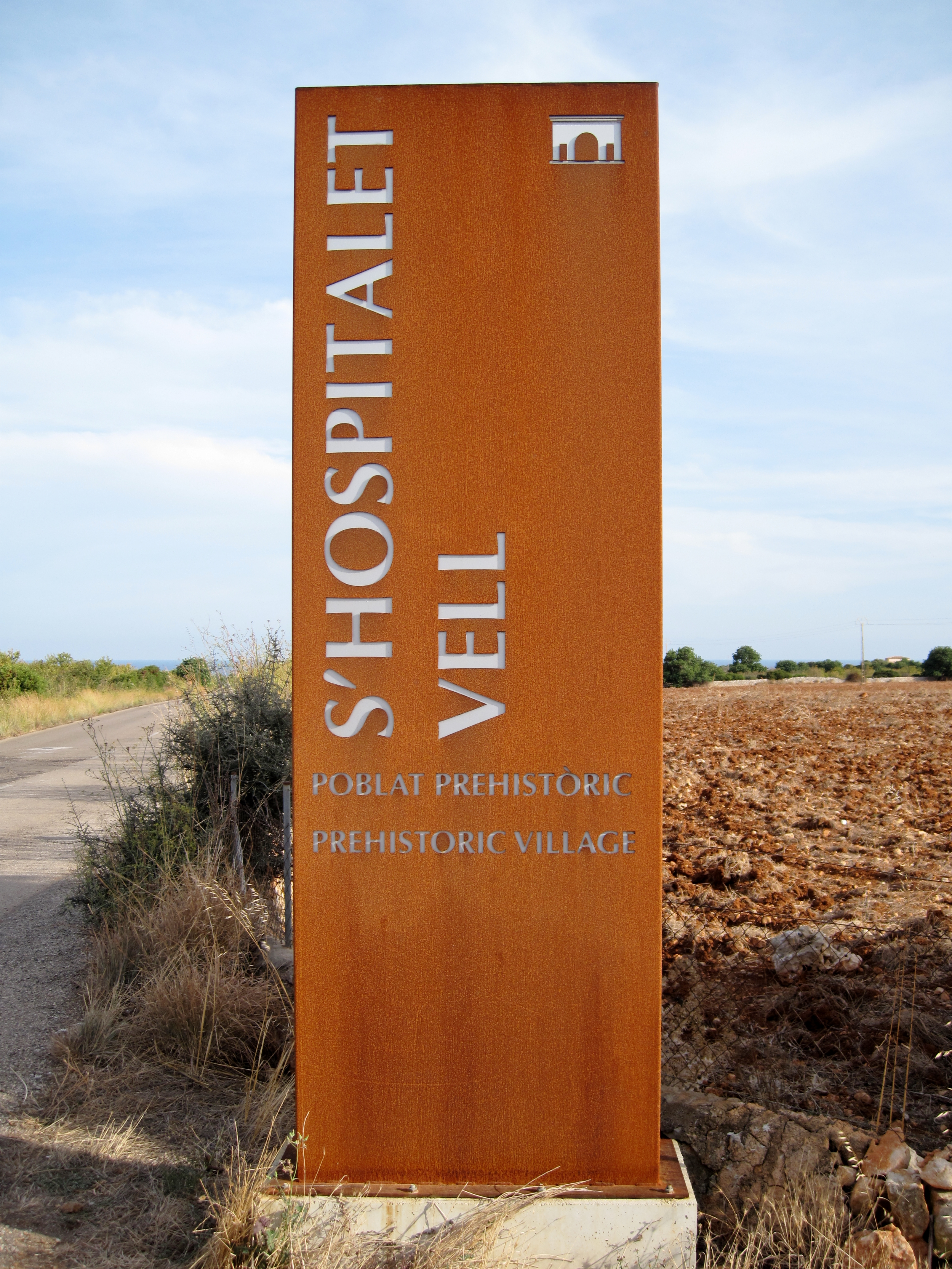 Hinweisschild zum talaiotischen Dorf von S’Hospitalet Vell, einer Ausgrabungsstätte in der Gemeinde Manacor, Mallorca, Spanien